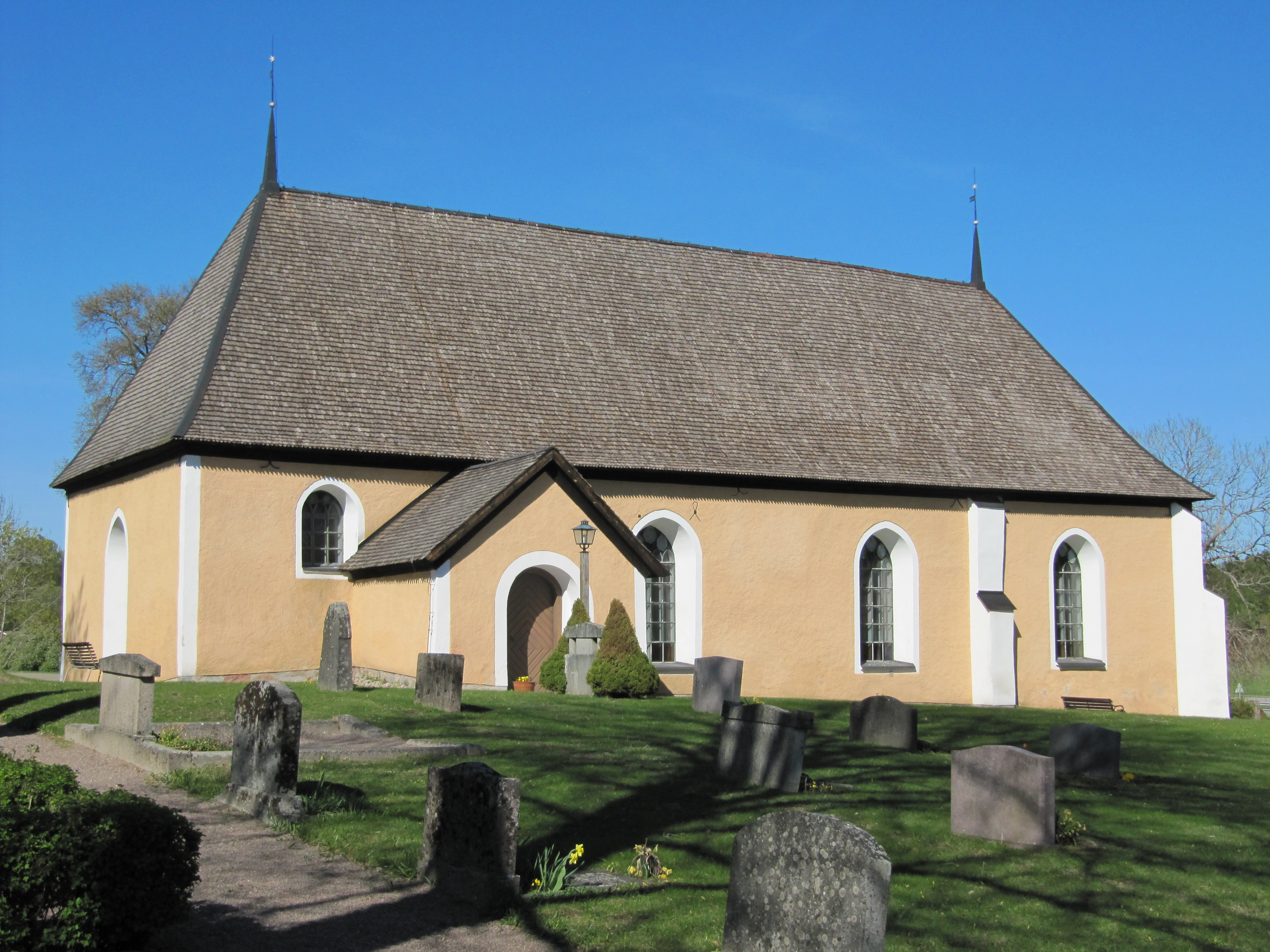 Almunge kyrka